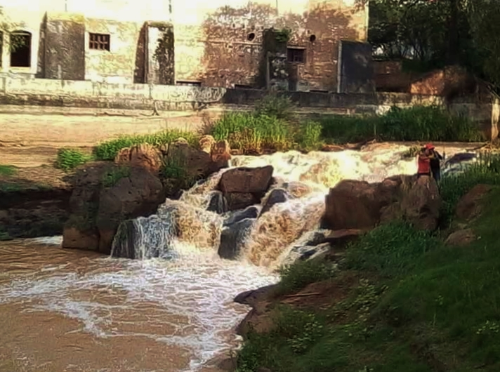 Molino y salto de agua en el rio Grande